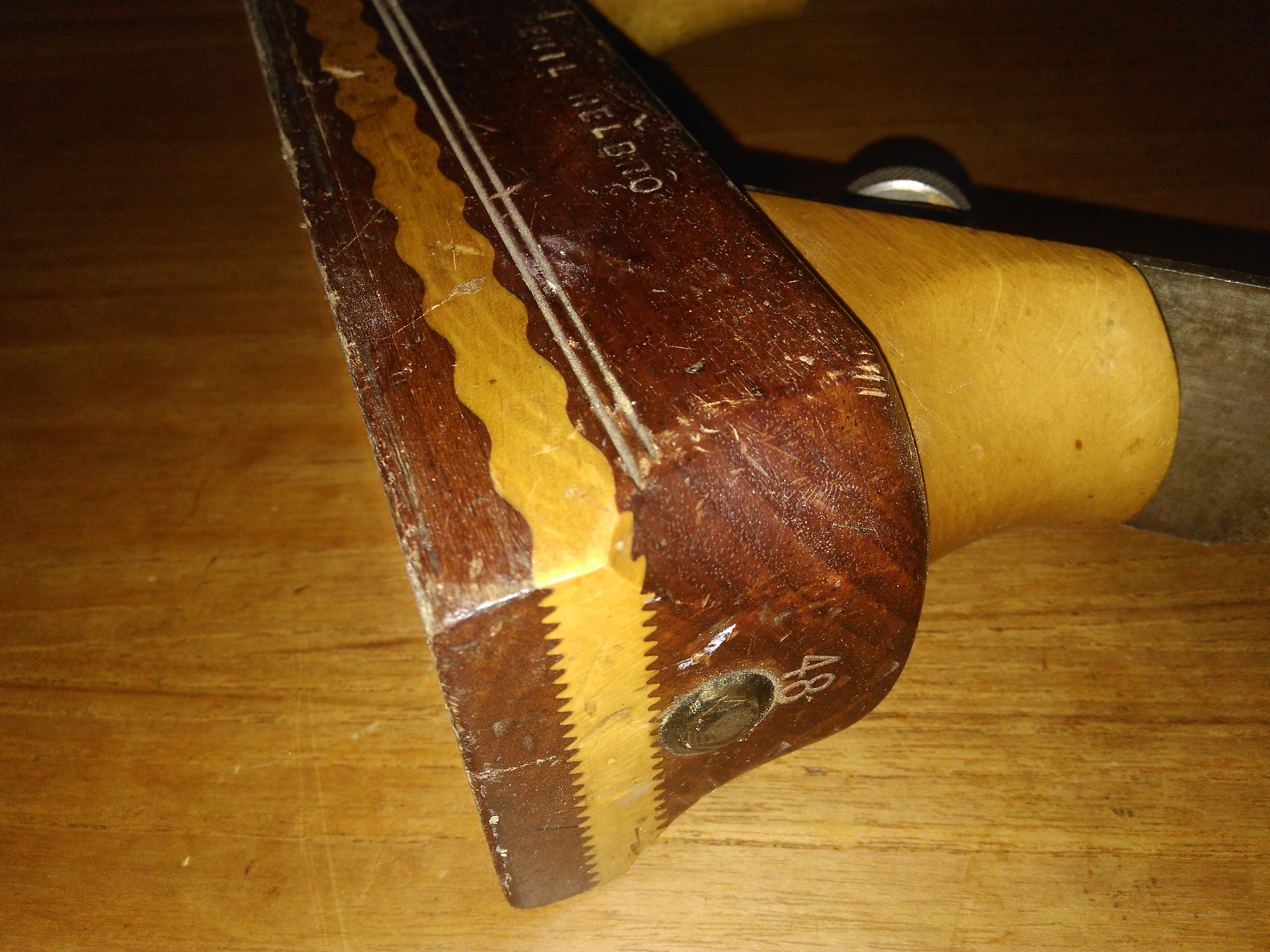 Pløjesamling i høvl af Mahogni Avnbøg og Pokkenholt